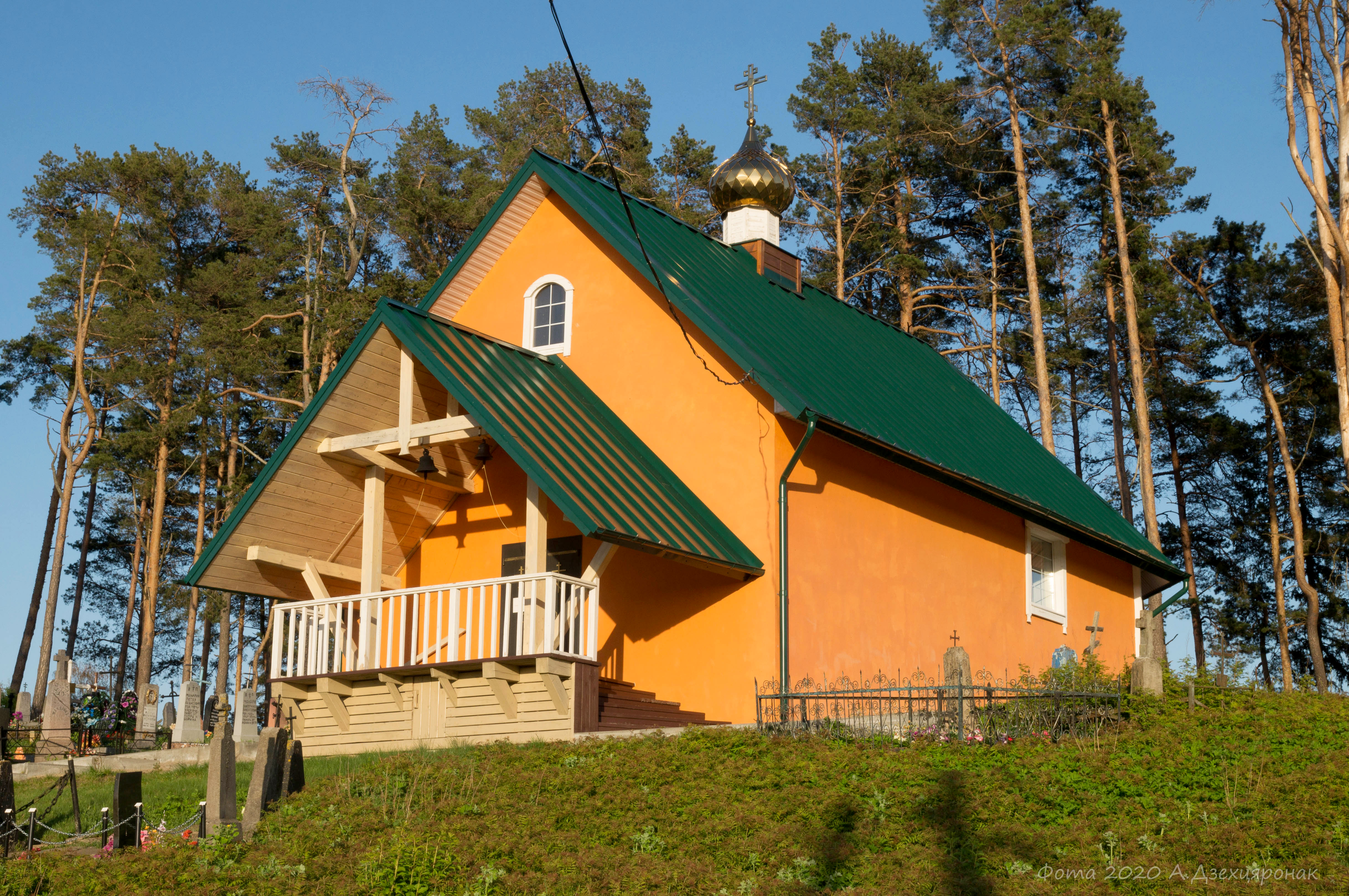 Царква Святой Елісаветы